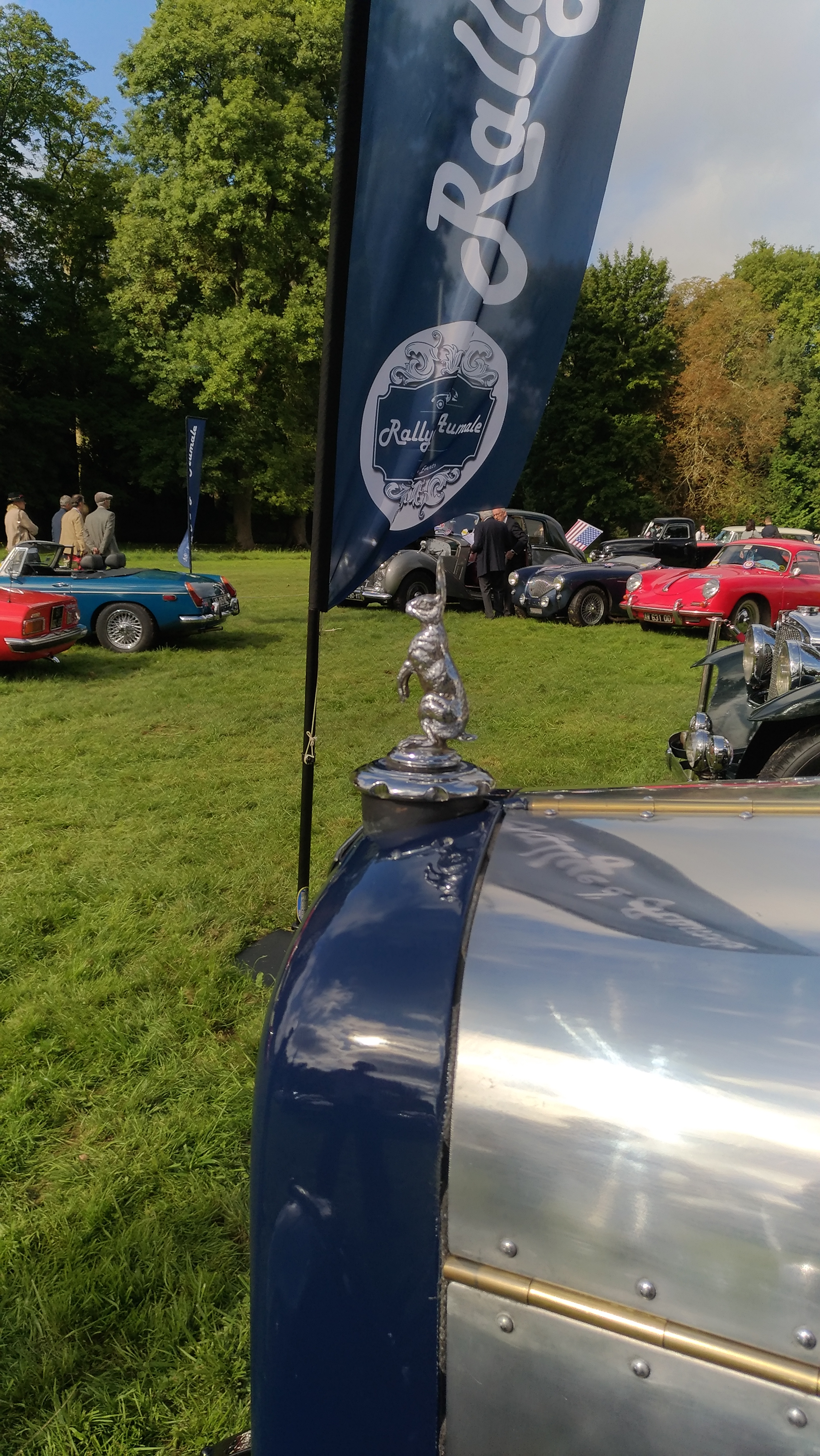 Rallye d'Aumale au Chantilly Arts & Elegance 2017